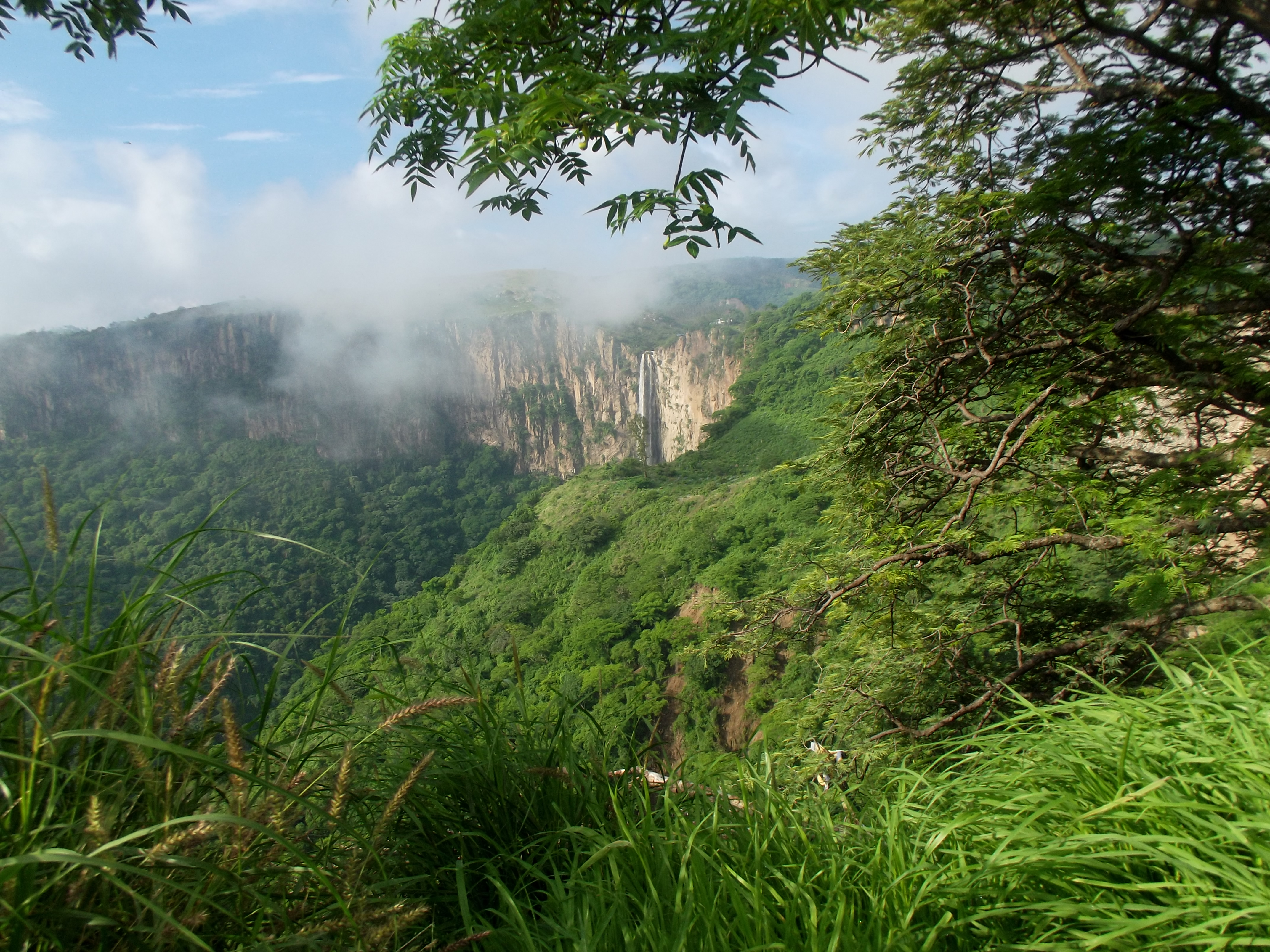 Cascada, Barranca de Huentitlan, Jalisco